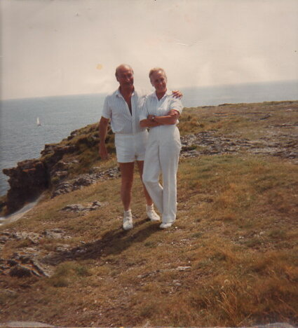 À l'ile de Groix